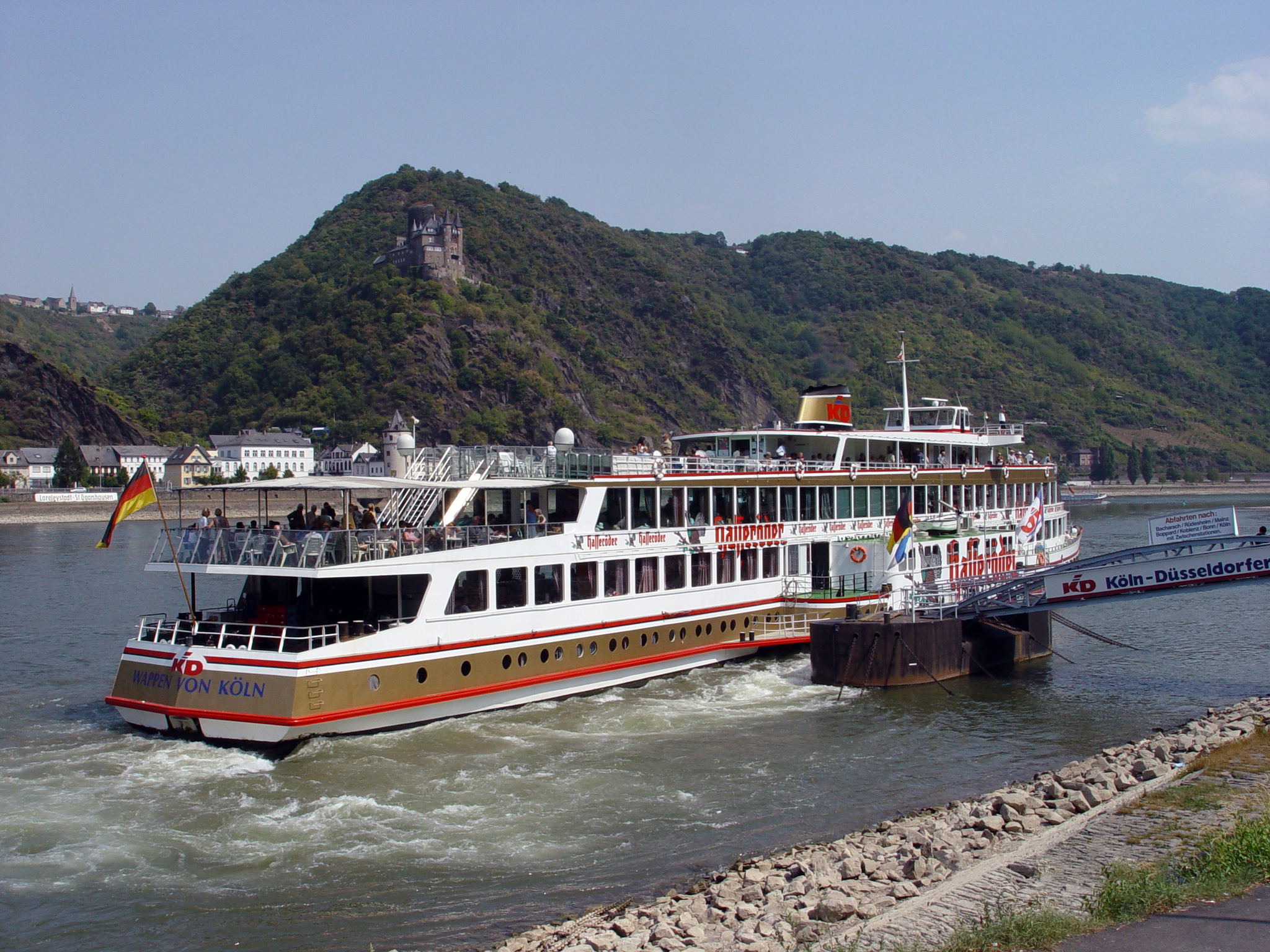 Wappen von Köln mit Hasseroder-Werbung im Jahr 2003 in St. Goar. Camera: Sony Cybershot License on Flickr (2011-02-02): CC-BY-SA-2.0 Flickr tags: Germany, Rhineland, Rhine